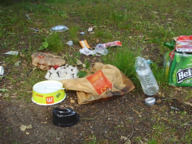 Détritus dans une forêt que des pique-niqueurs inconscients ont laissé. Emballages d'un repas pris au fast-food.